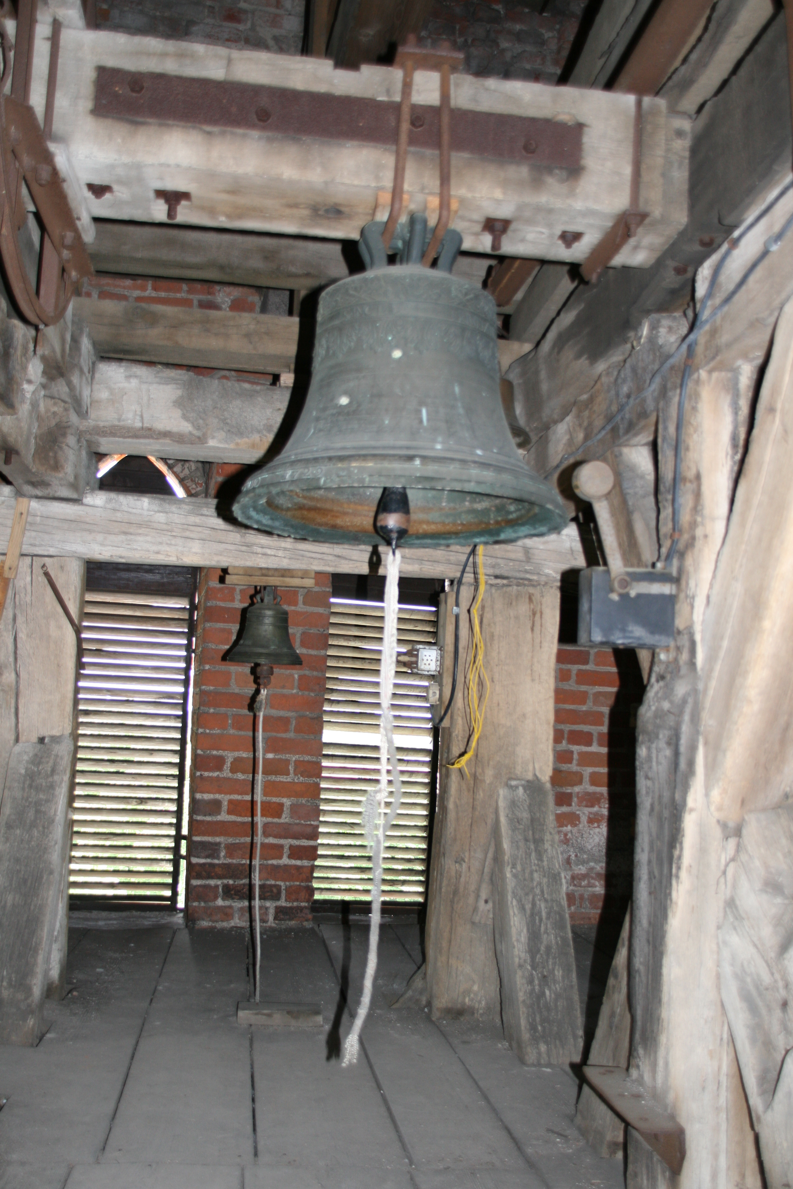 2 alte Glocken aus der Zeit Friedrich-Wilhelm I. im Glockenturm in Friedland/Prawdinsk (Ostpreußen; Kaliningrad Oblast)